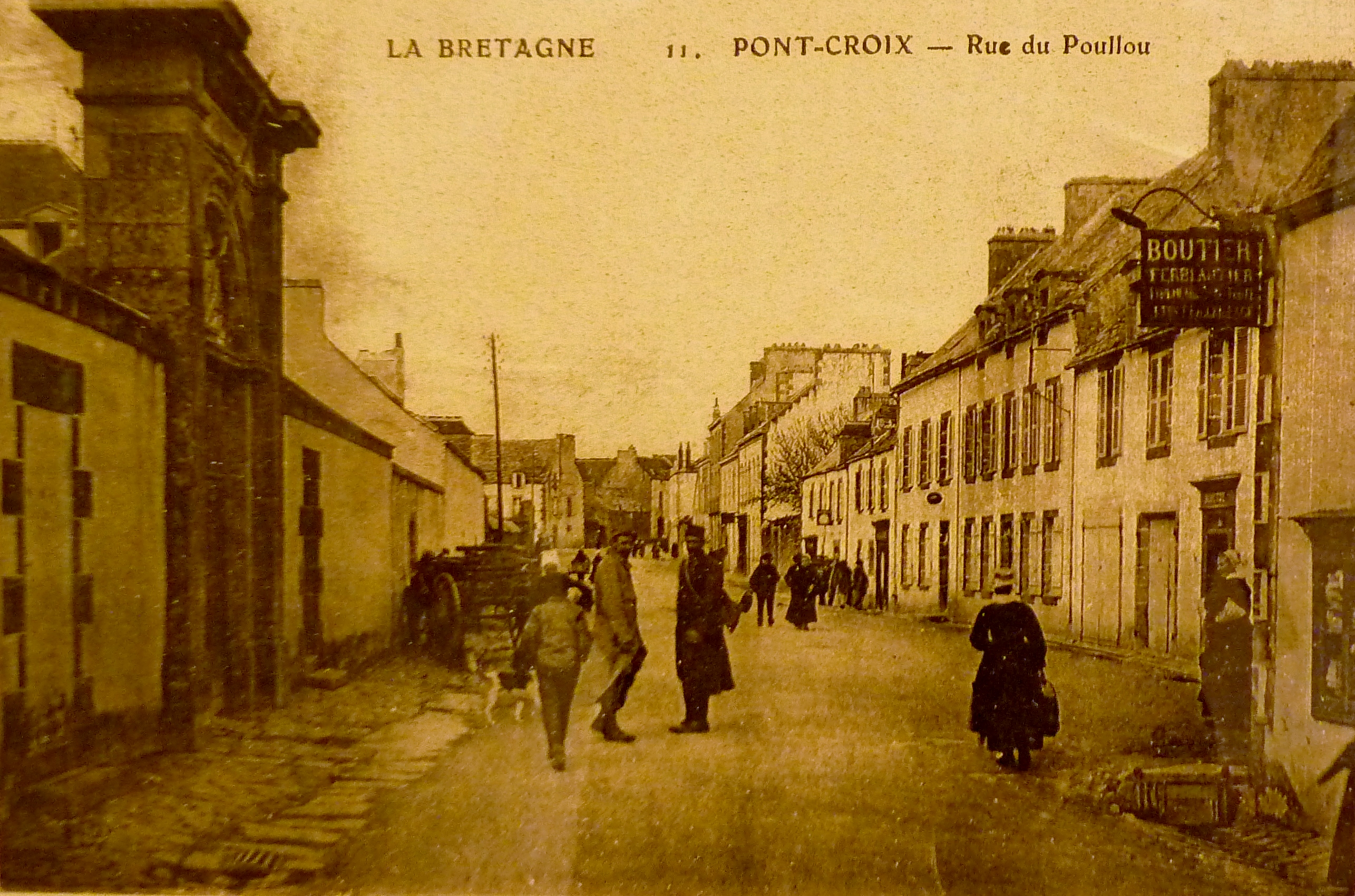 Pont-Croix : la Rue du Poullou (actuel boulevard du général De Gaulle) pendant la Première Guerre mondiale ; le collège était alors transformé en hôpital militaire.